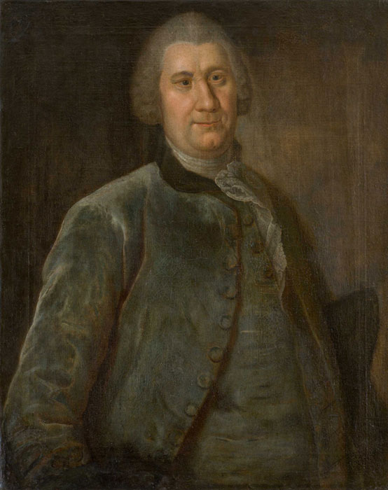 Berend Johann von Bock (1701–1769)